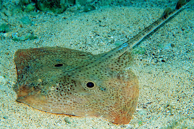 Raja miraletus Linnaeus 1758